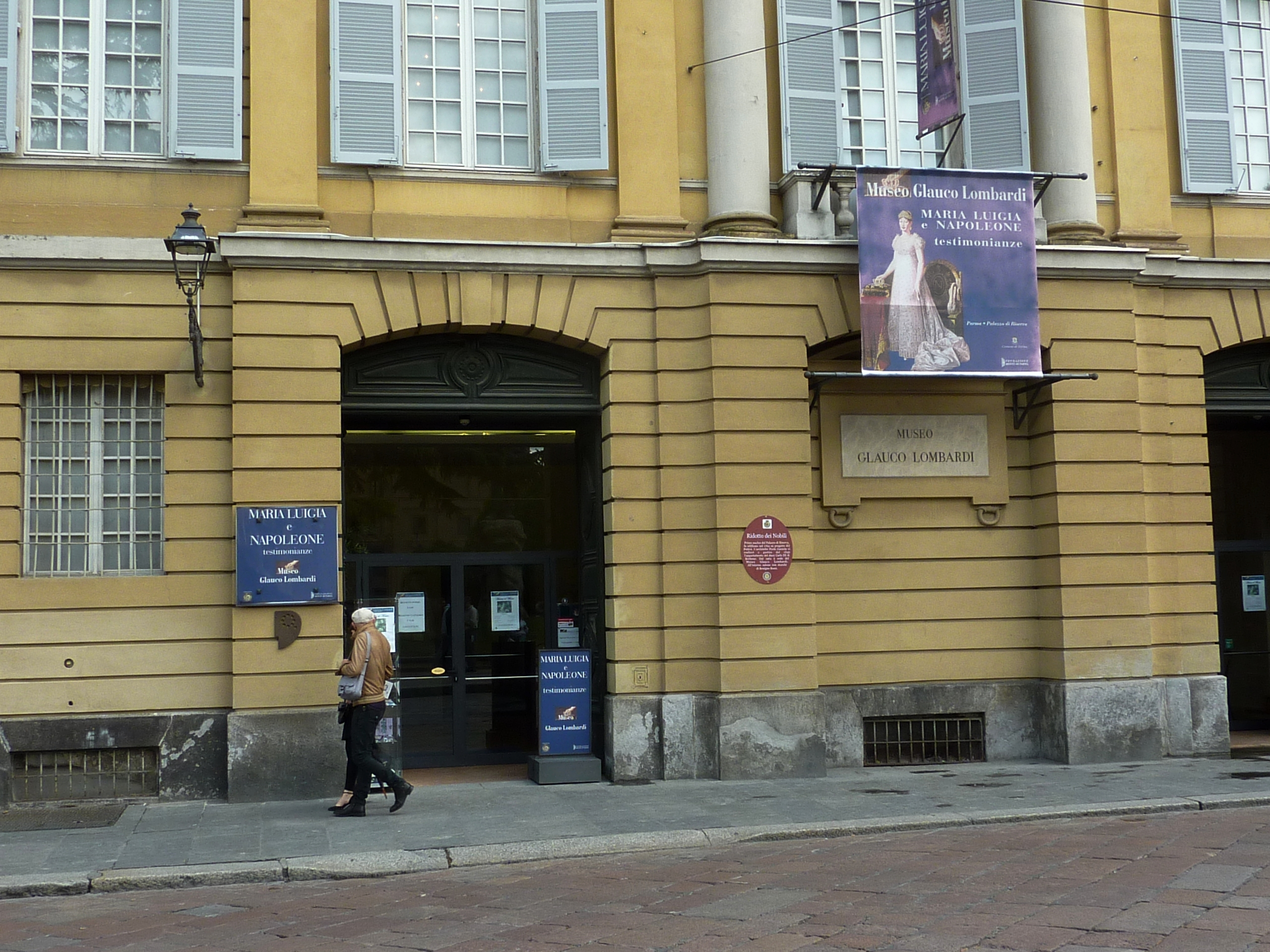 Ingresso del Museo Glauco Lombardi (Parma).